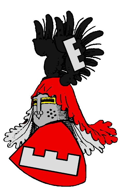 Stammwappen der Rautter (historisch auch Rauter oder Rautern), eines preußischen im Mannesstamm erloschenen Adelsgeschlechts.